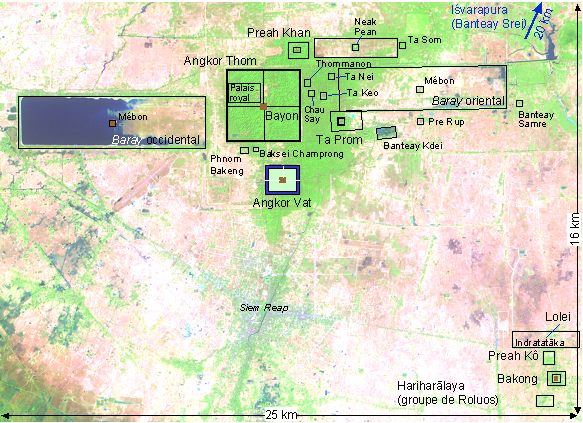 Plan grossier d'implantation des principaux monuments du site d'Angkor Illustration personnelle, libre de droits Catégorie:Angkor